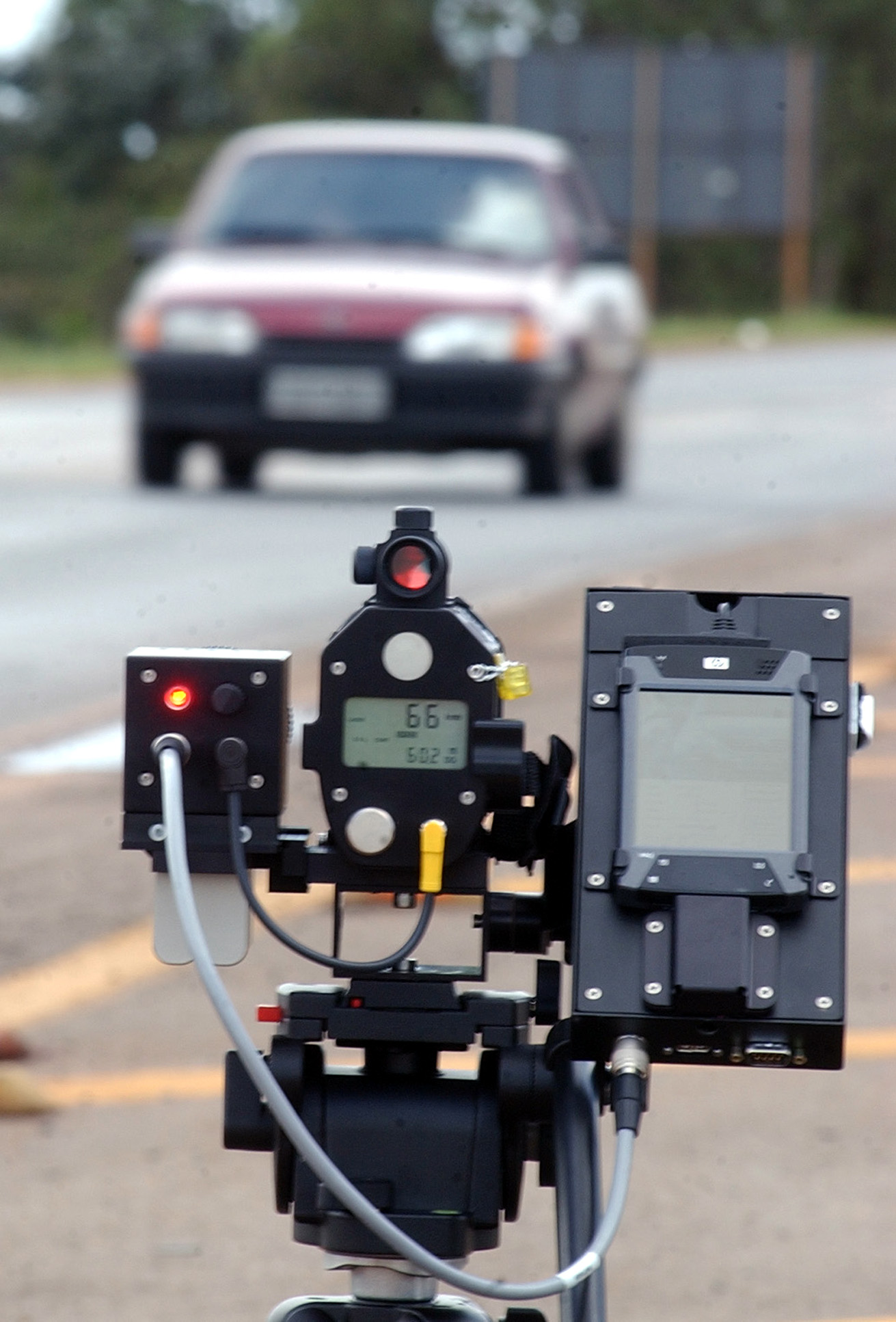 Brasília - Polícia Rodoviária Federal usa novo radar com microdigicam para capturar imagens na fiscalização das rodovias durante a terça-feira de Carnaval de 2007.